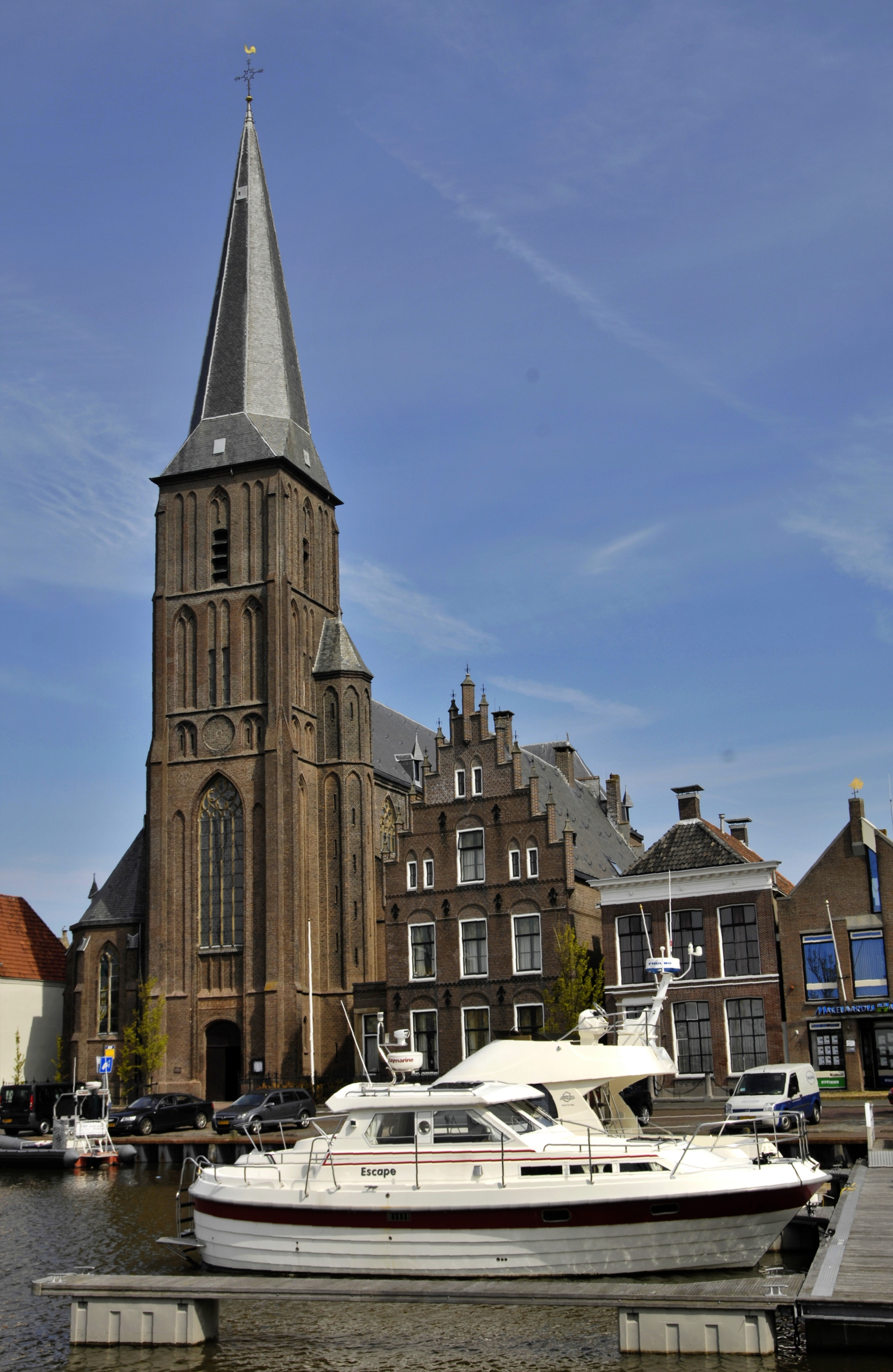 Harlingen: Mit dem Boot in die Kirche, kein Problem